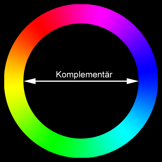 Komplementärfarben